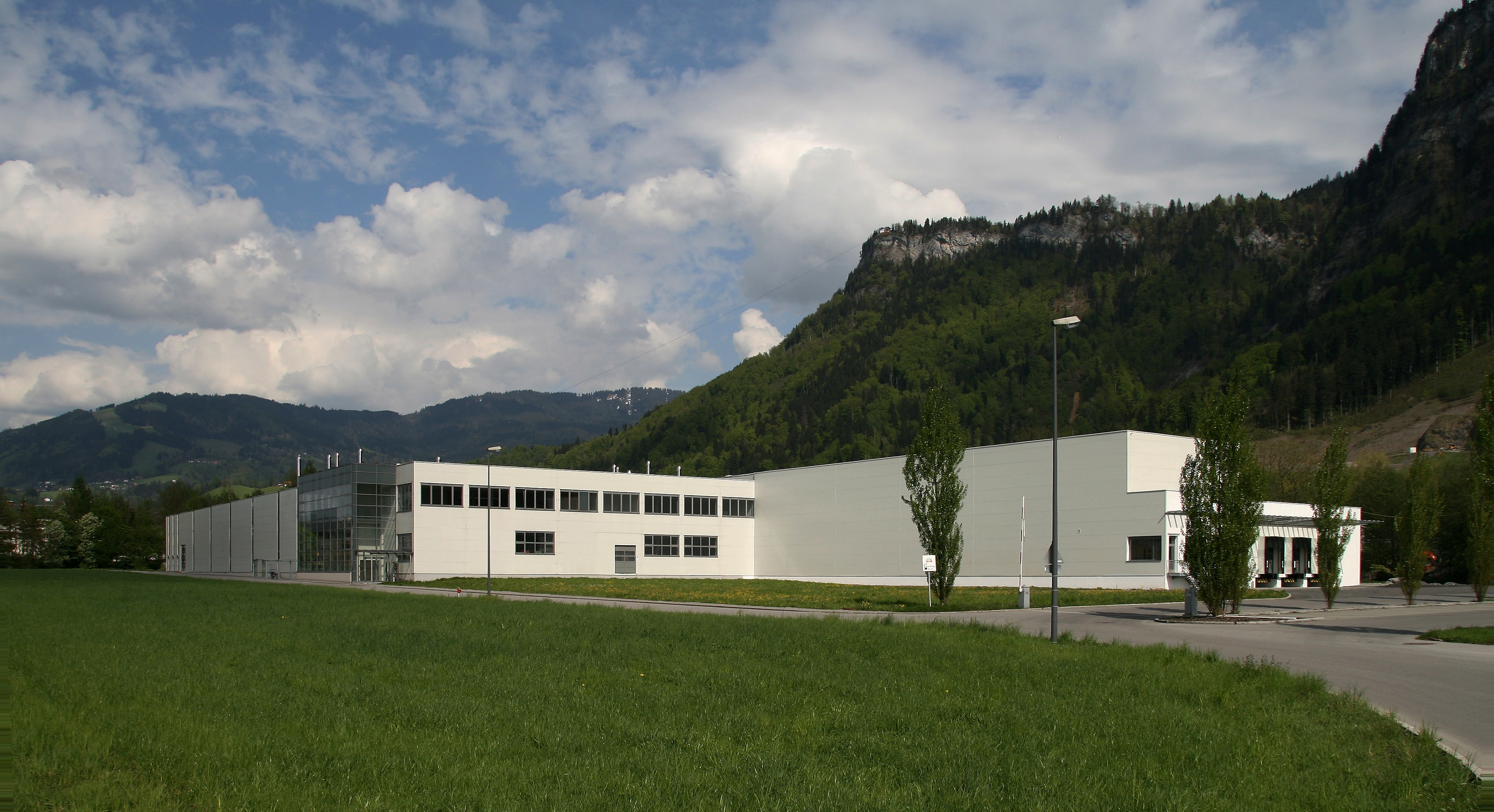 Die Rudolf Ölz Meisterbäcker GmbH ist ein österreichischer Backwarenhersteller. Ihren Hauptsitz hat die Gesellschaft in Dornbirn im Bundesland Vorarlberg, wo sie der zweitgrößte Arbeitgeber der Stadt ist. Nach eigenen Angaben ist Ölz Marktführer bei Backwaren in Österreich. Besonders bekannt wurde das Unternehmen im Jahr 1953 mit der Erfindung der Backerbsen sowie deren erstmaligem Verkauf.*** Hier das Werk Wallenmahd im Bezirk Hatlerdorf in Dornbirn.